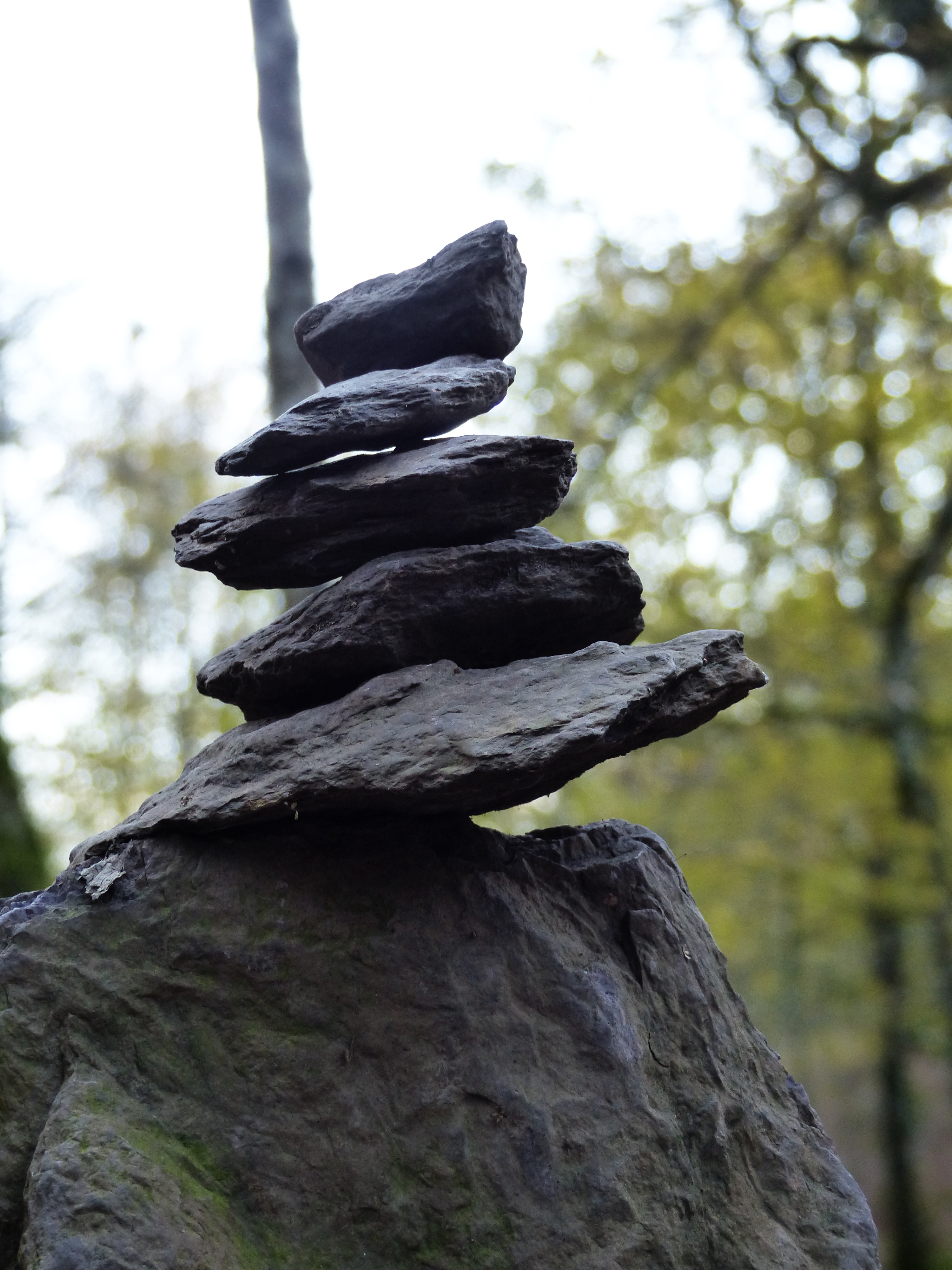 Tas de cailloux empilés (par des touristes ou des néo-druides) dans le Val sans Retour, Bretagne, automne 2017